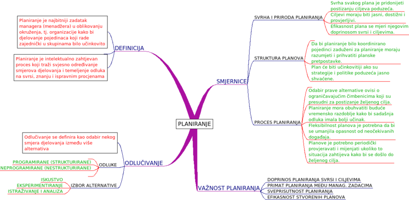 Mentalna mapa sa obilježjima planiranja